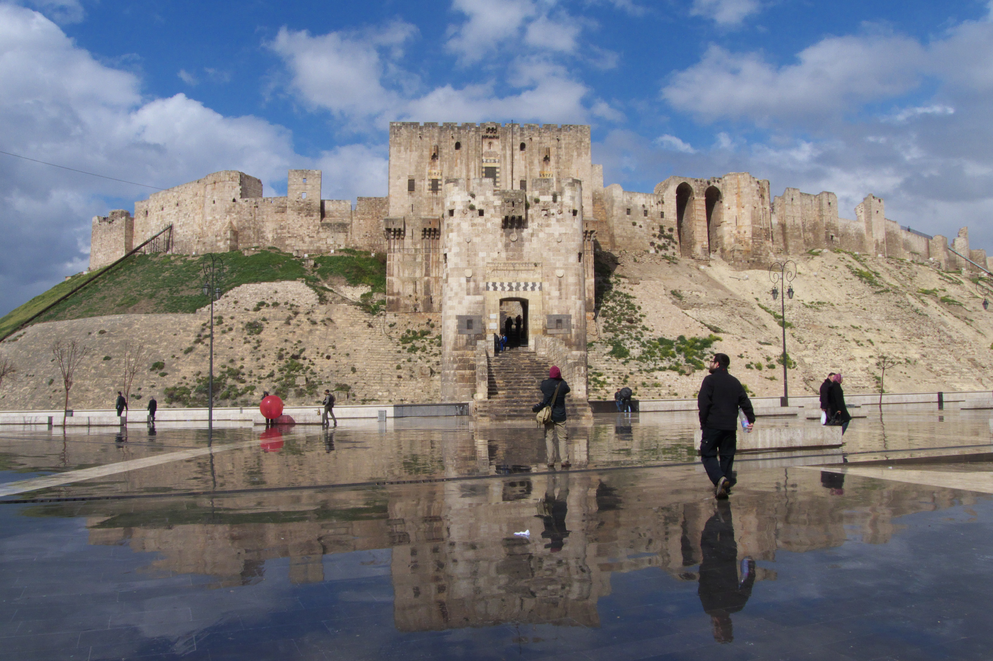 Aleppo Citadel